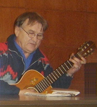 Miroslav Ilić (Bilje), pjesnik iz Bilja